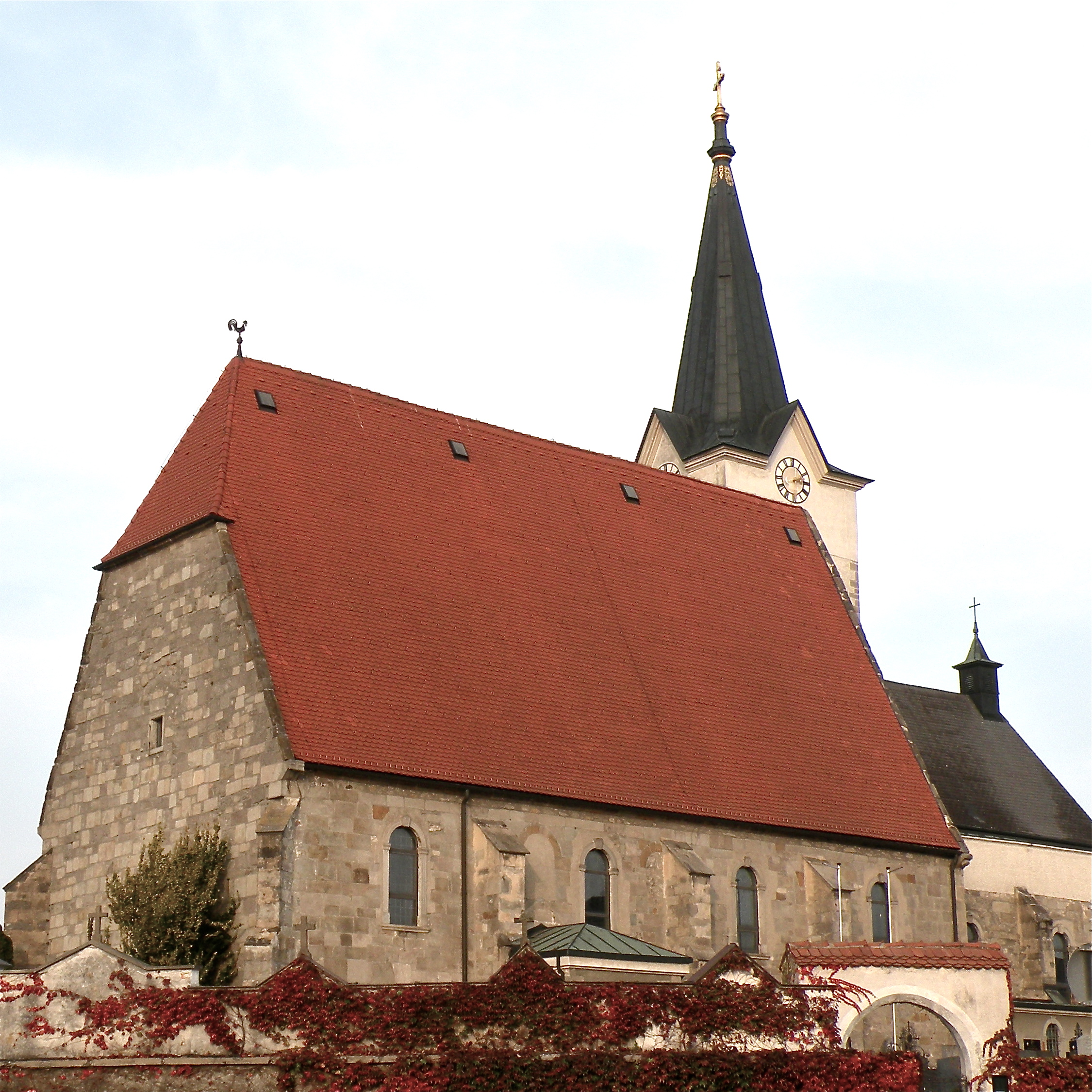 Pfarrkirche Naarn im Machlande (Südansicht) im Bezirk Perg in Oberösterreich